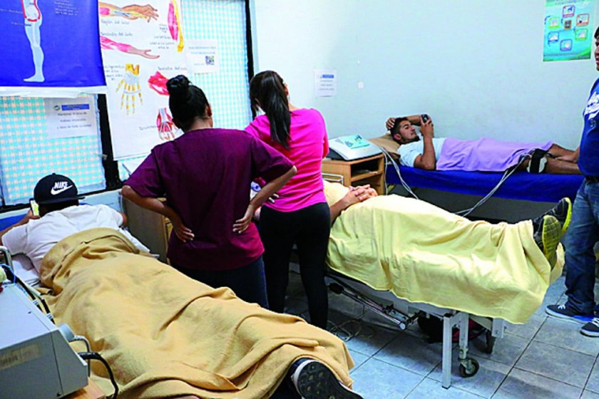 Sala de salud